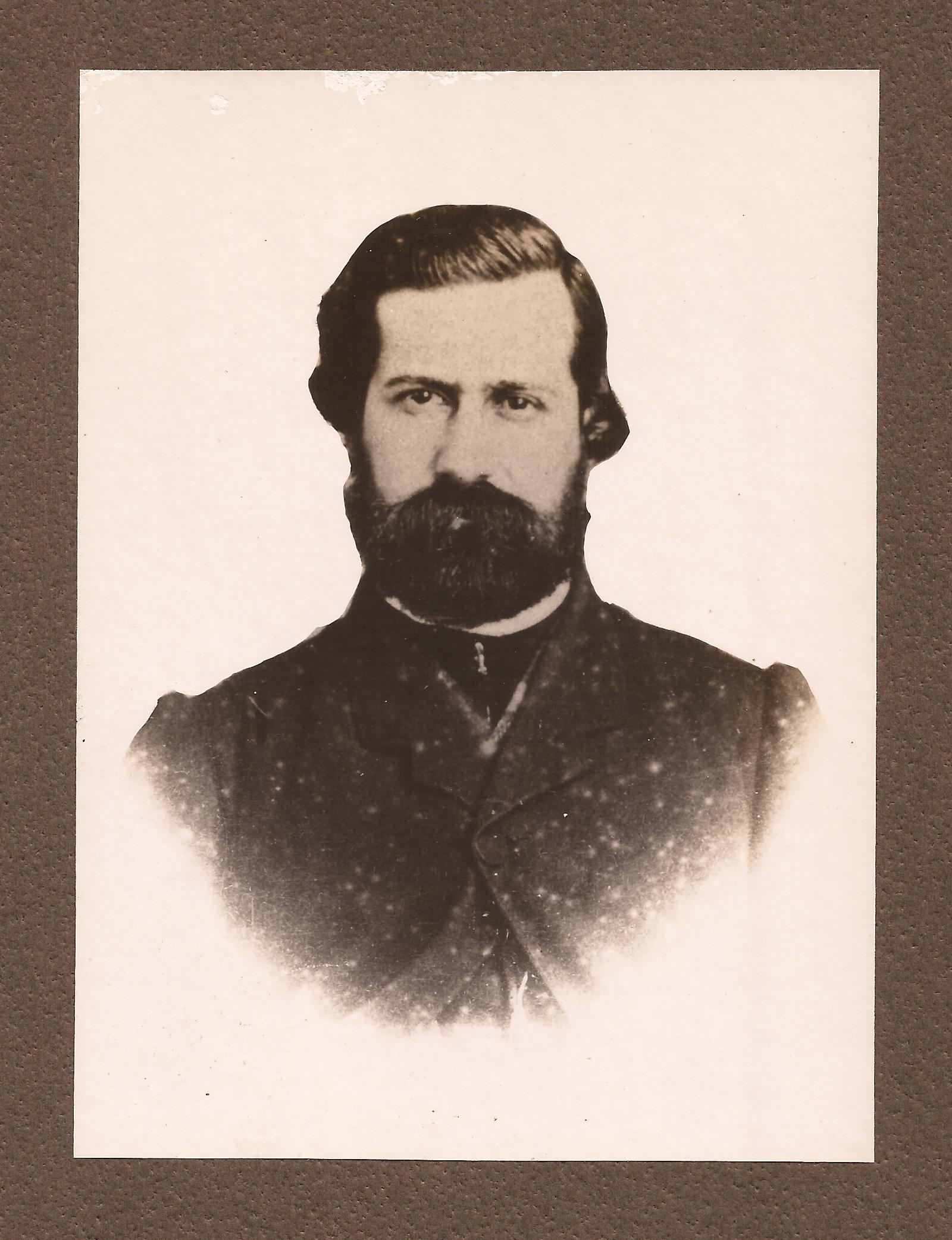 Manuel Obarrio en 1866 (30 años)